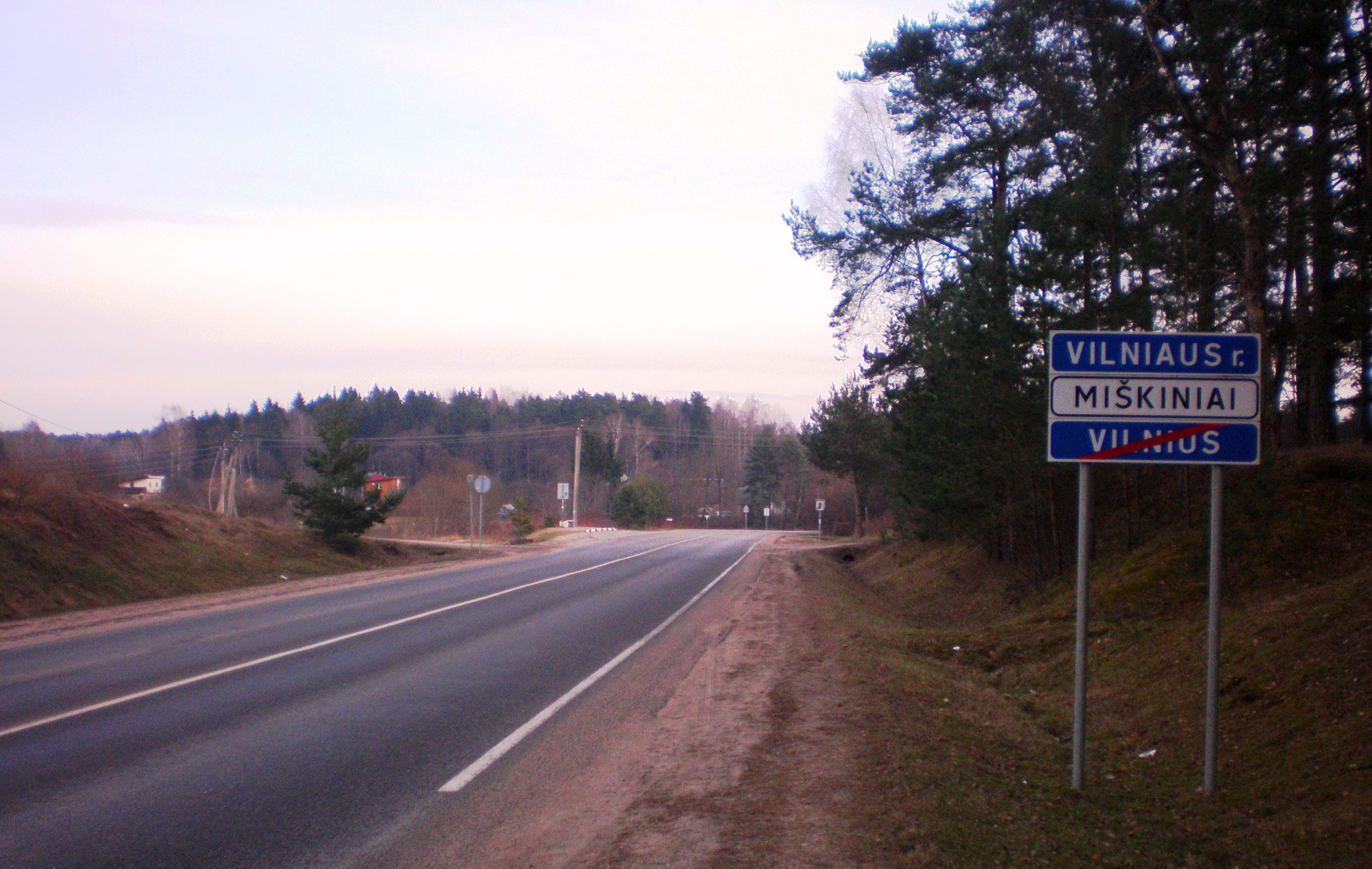 Miškiniai, Vilniaus raj.